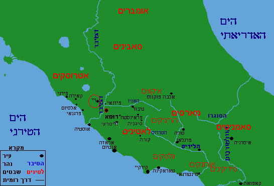 מיקומה של העיר ויי באיטליה העתיקה